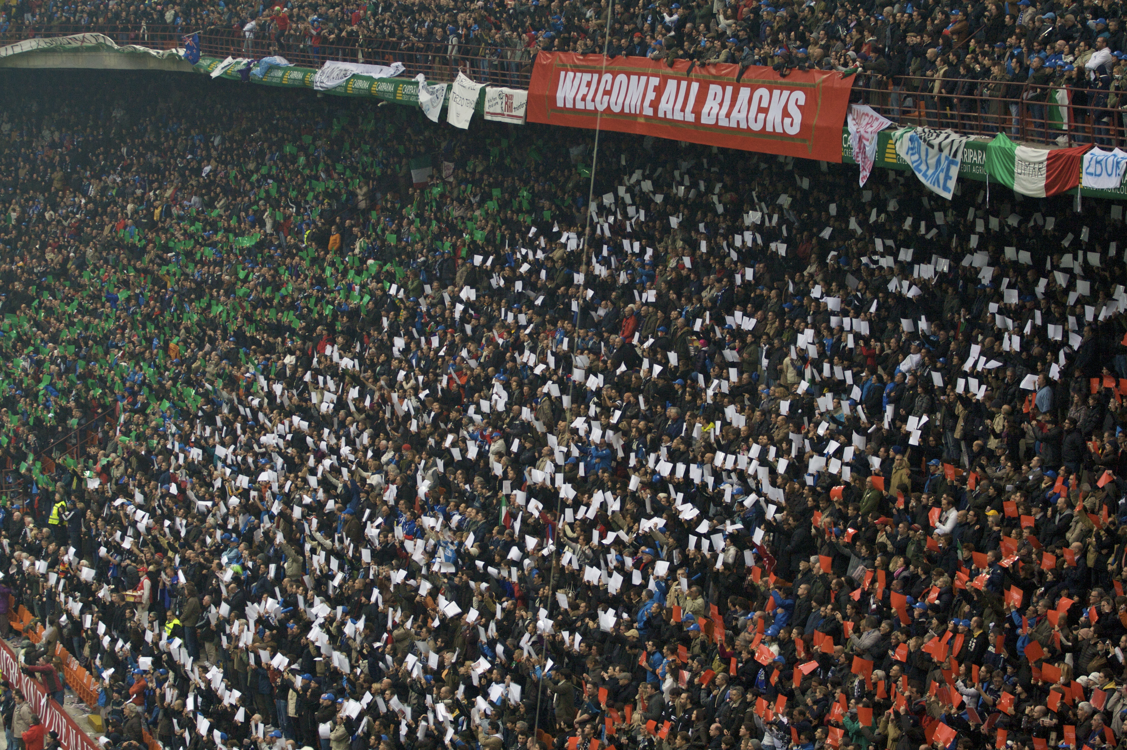 Tribune italienne lors de la rencontre Italie-Nouvelle-Zélande en rugby à XV en novembre 2009.